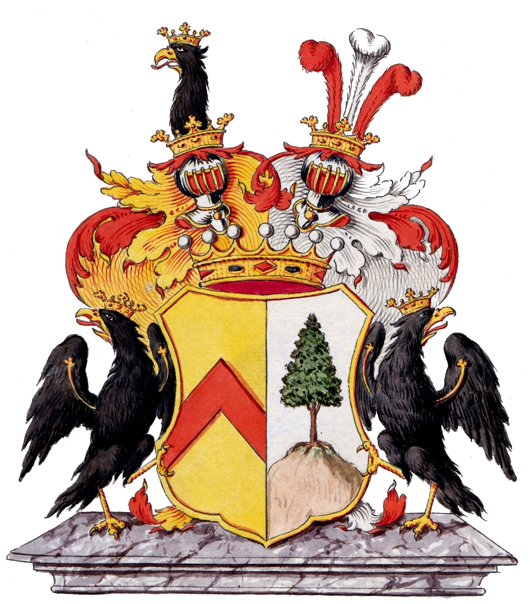 Wappen der Baronen von Baumberger